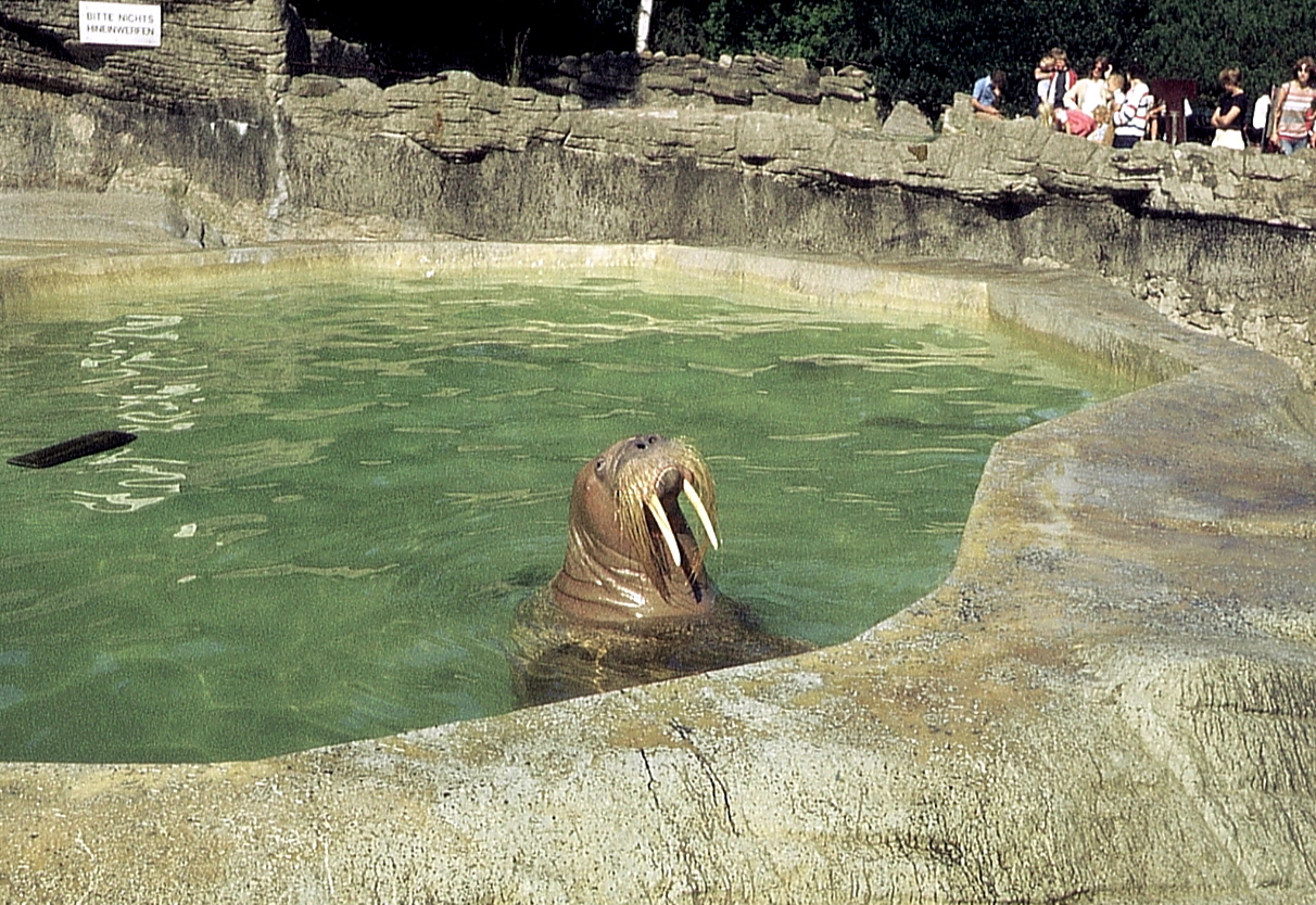 Antje at Hagenbeck-Zoo (Mascot of Norddeutscher Rundfunk)